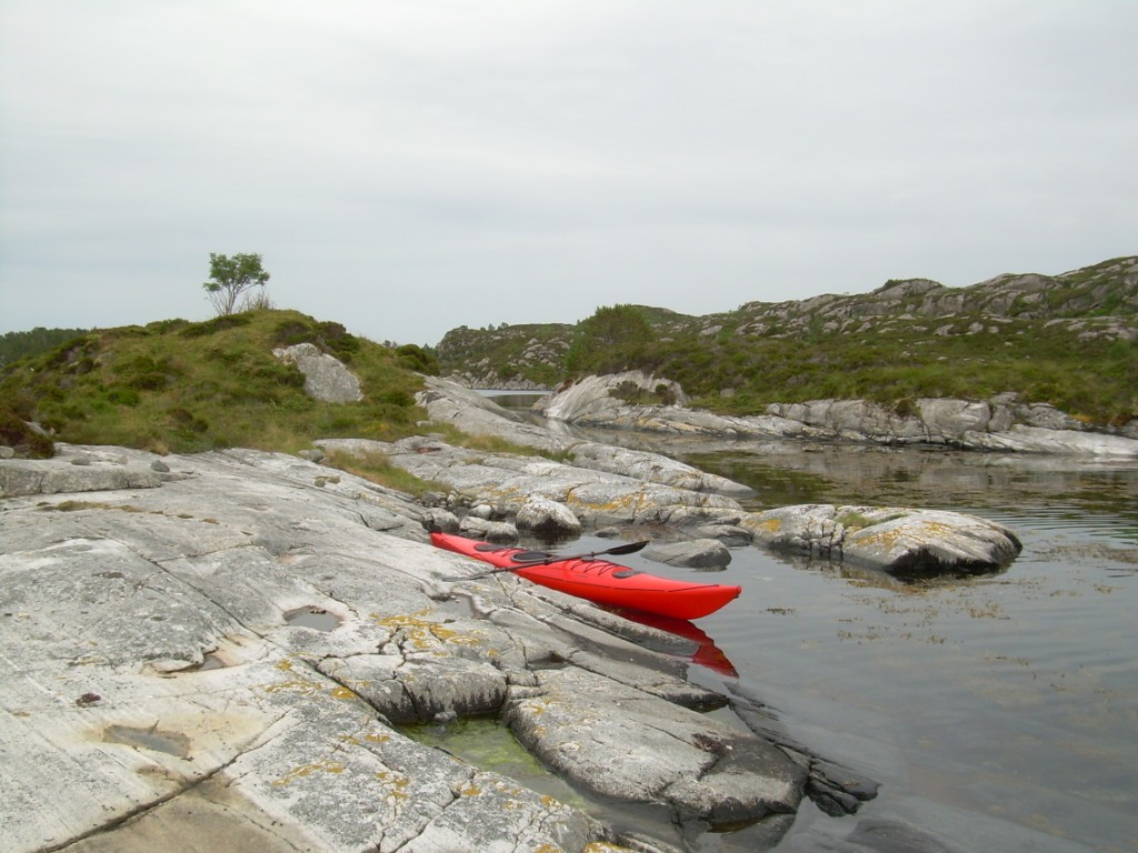 Kajakkpadling vest for Byrknesøy